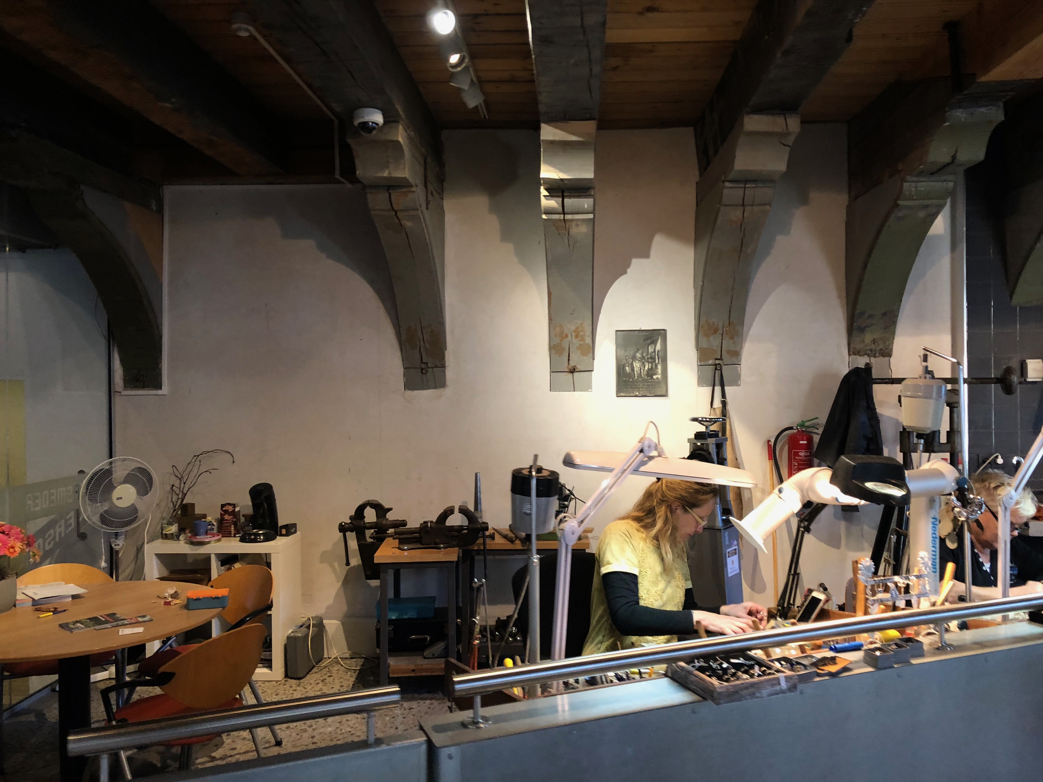 Interieur Zilvermuseum Schoonhoven